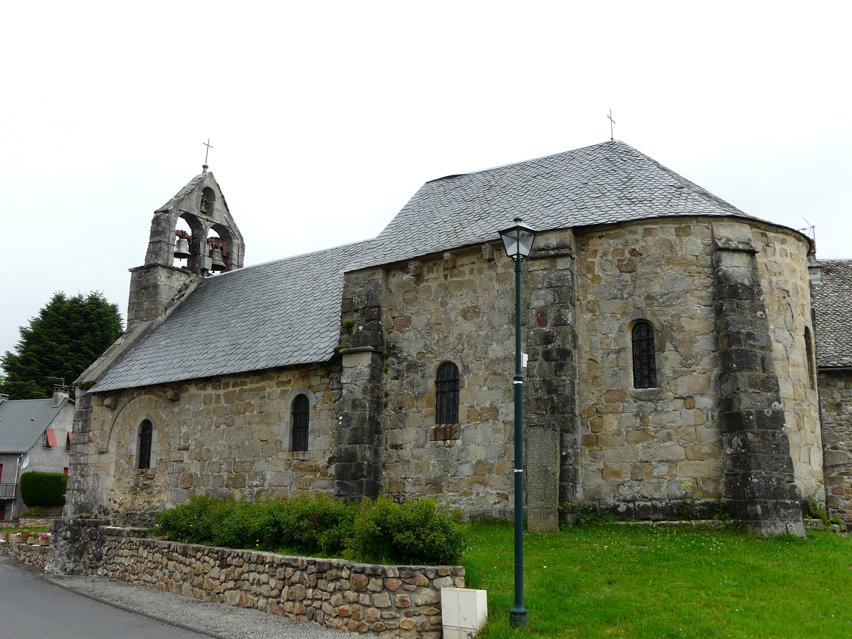 L'église Notre-Dame, Labessette, Puy-de-Dôme, France.